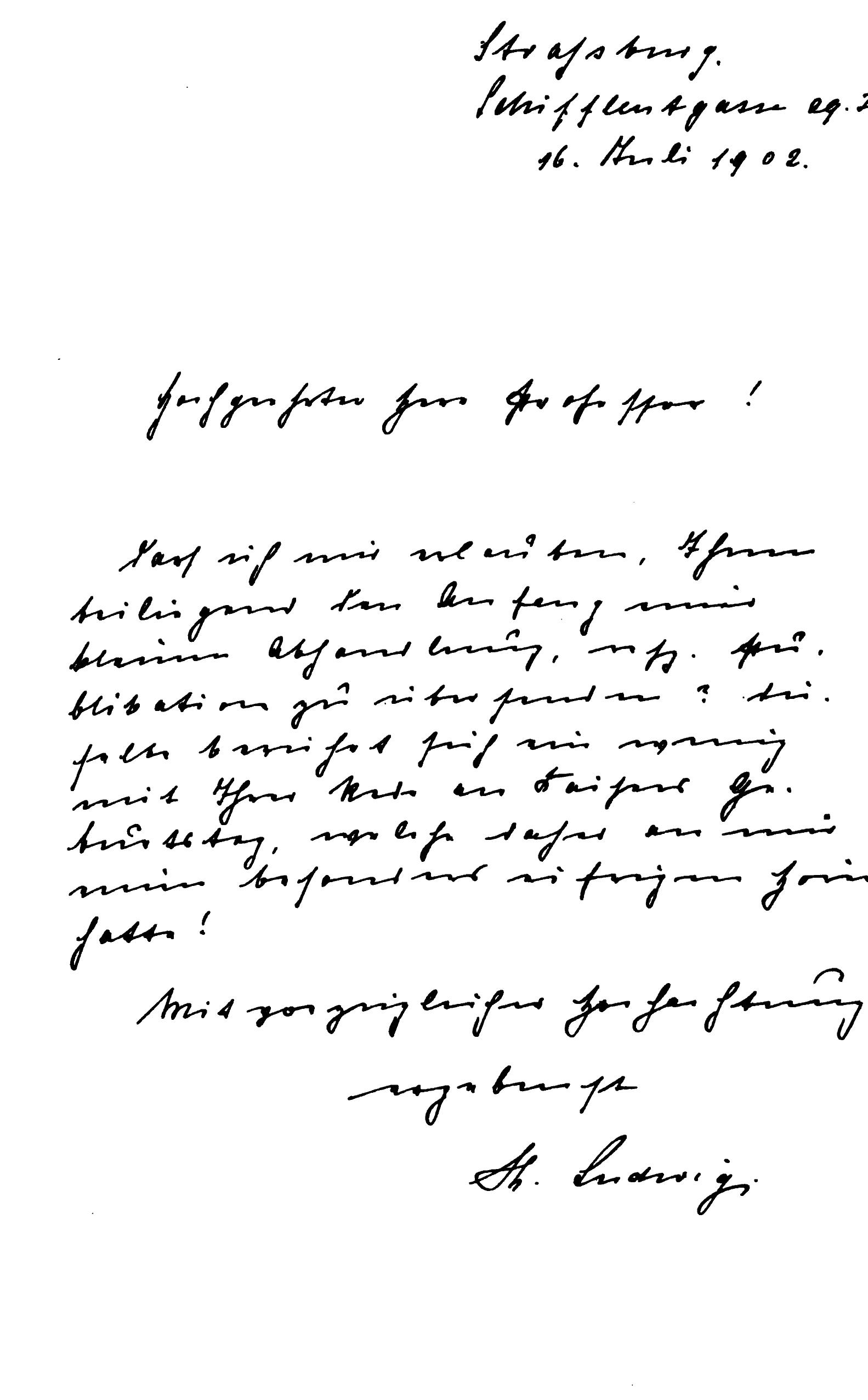 Autograph Theodor Ludwig. In: Aktenstücke zur Geschichte der badischen Concordatsbestrebungen in der Zeit Napoleons I., Mohr (P. Siebeck), 1902